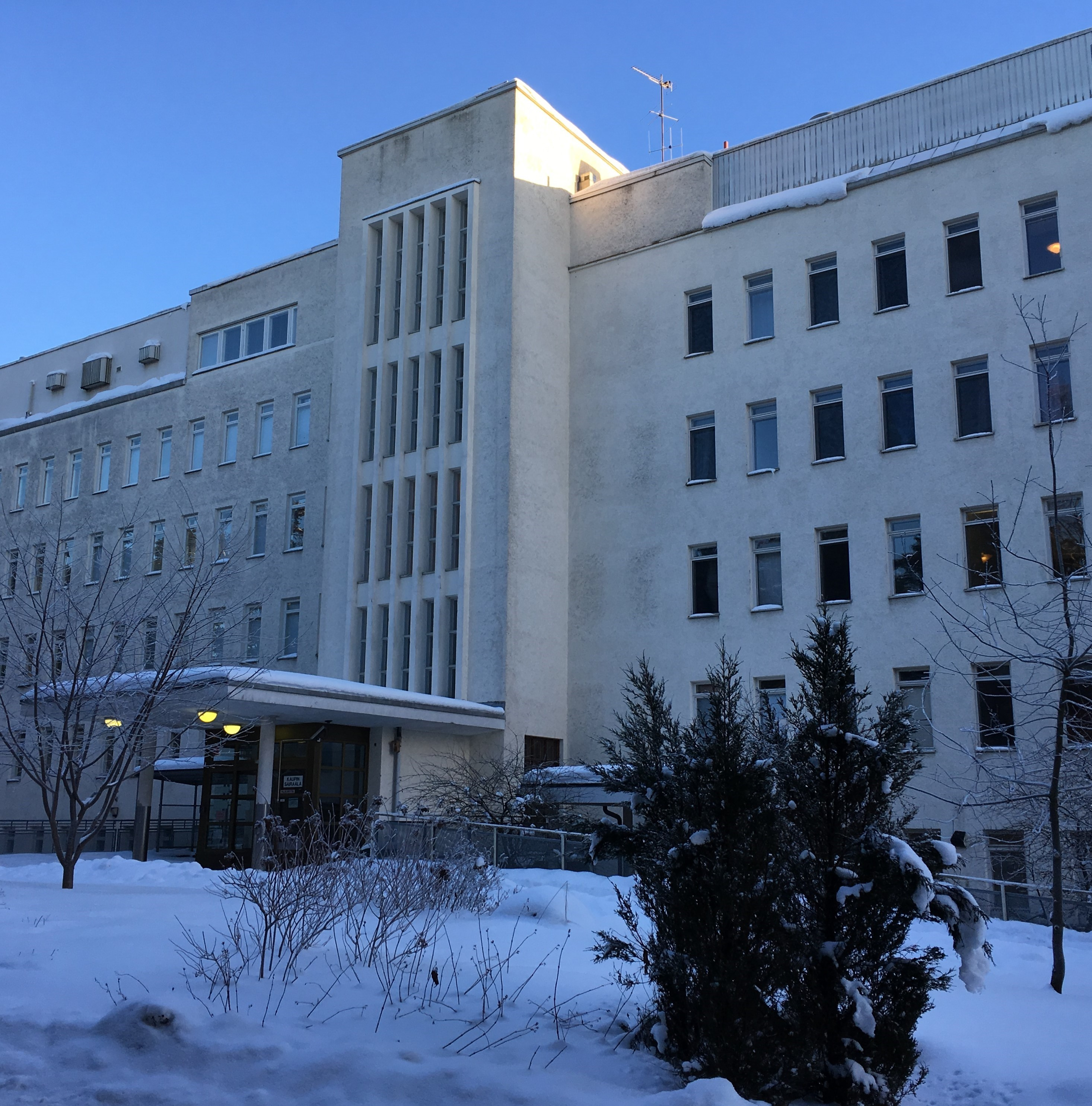 Entisen Kaupin sairaalan pohjoista julkisivua helmikuussa 2018. Sairaalan toiminta päättyi vuonna 2016.